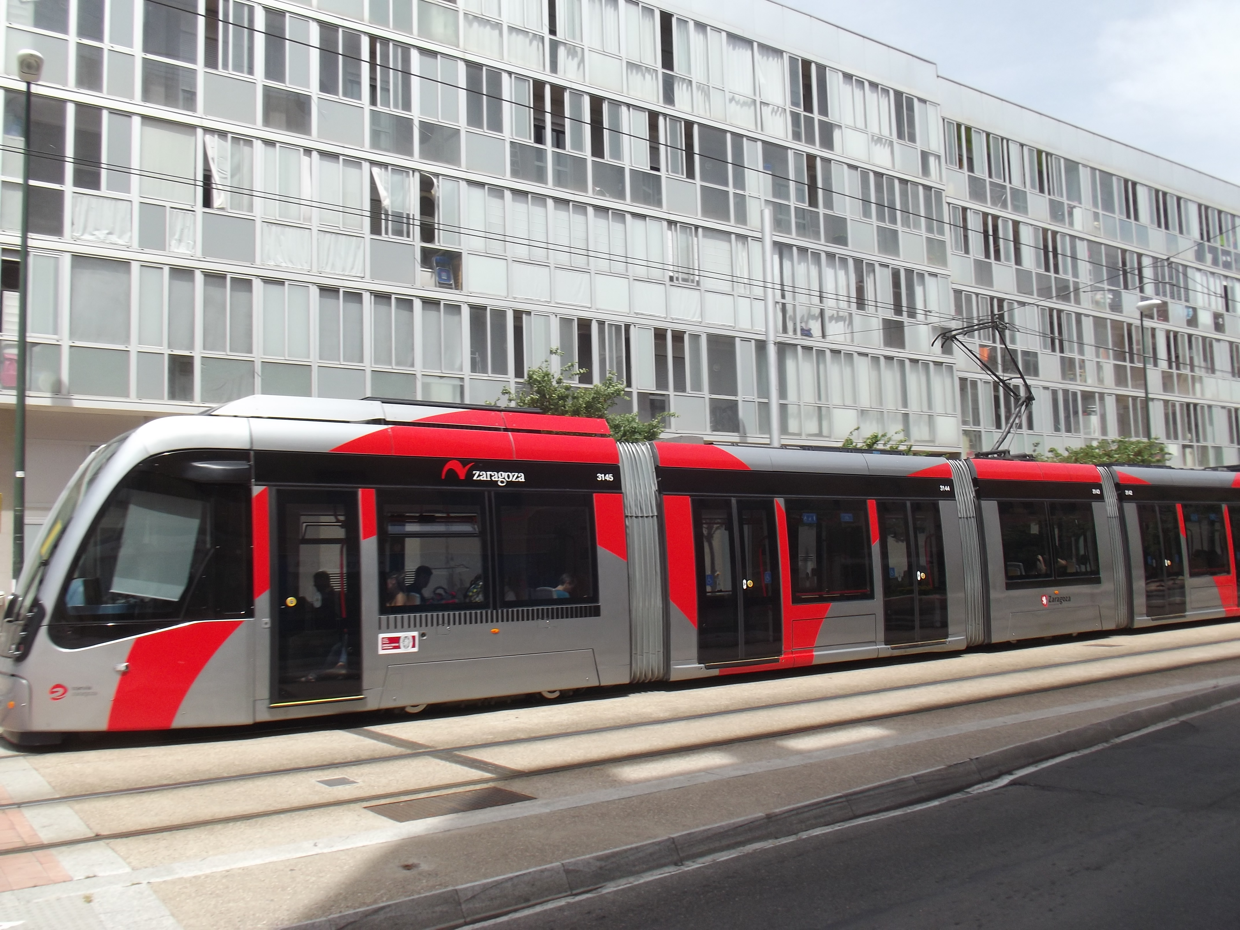 Tram dicht bij het noordelijk eindpunt